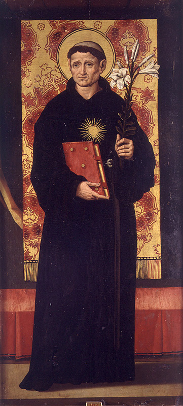 La obra representa al religioso agustino San Nicolás de Tolentino (1245-1305).